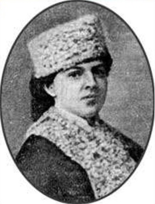 Retrat d'Elizaveta Litvinova (1862-1919), matemàtica russa